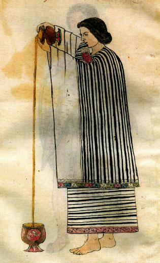 Bild från en aztekisk kodex som visar metoden för huer man skummar majs- och chokladdrycker